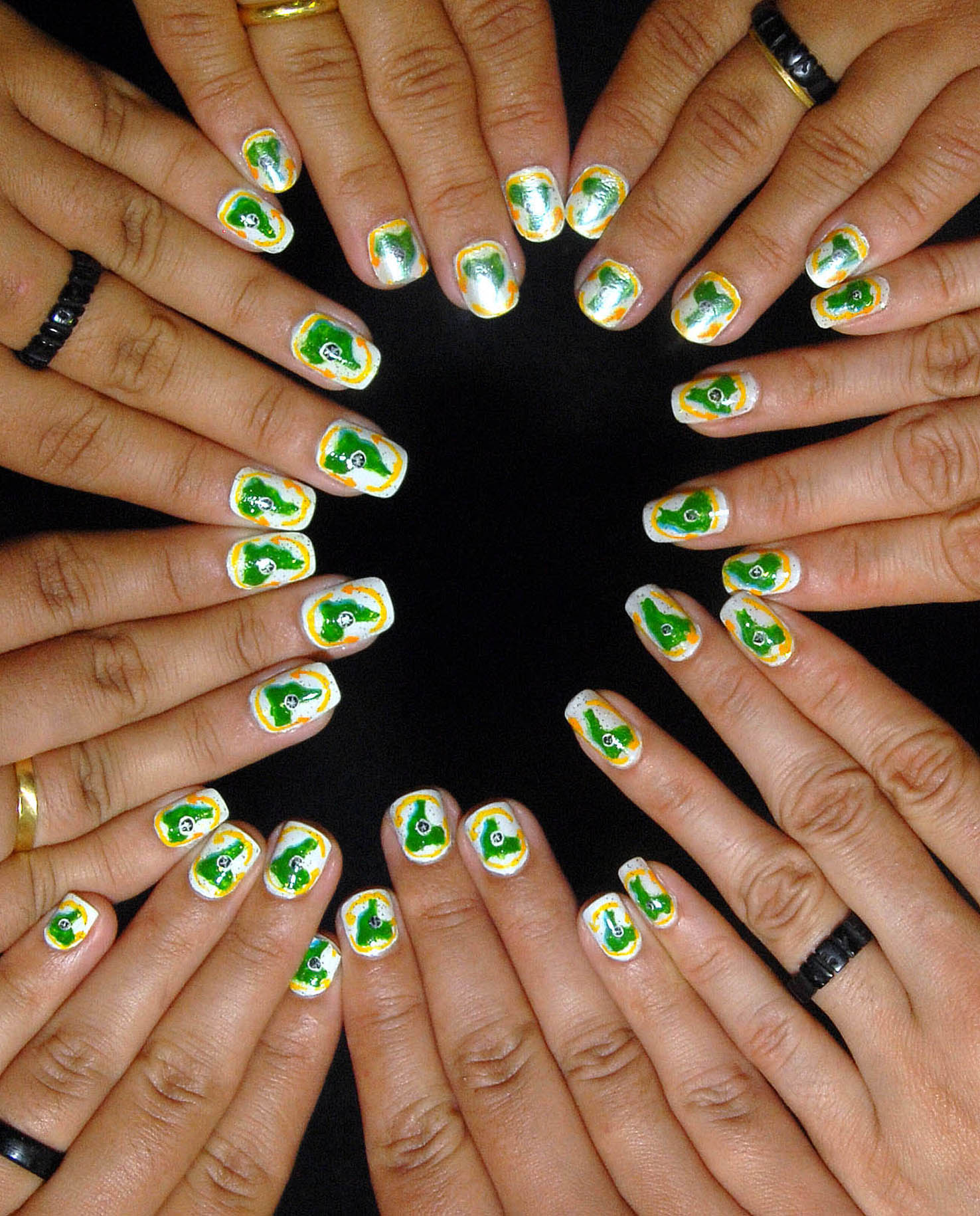 Em Belém, rondonistas exibem unhas pintadas com o símbolo do Projeto Rondon, durante cerimônia de encerramento da Operação Grão-Pará, no Centro de Instrução Almirante Braz de Aguiar.